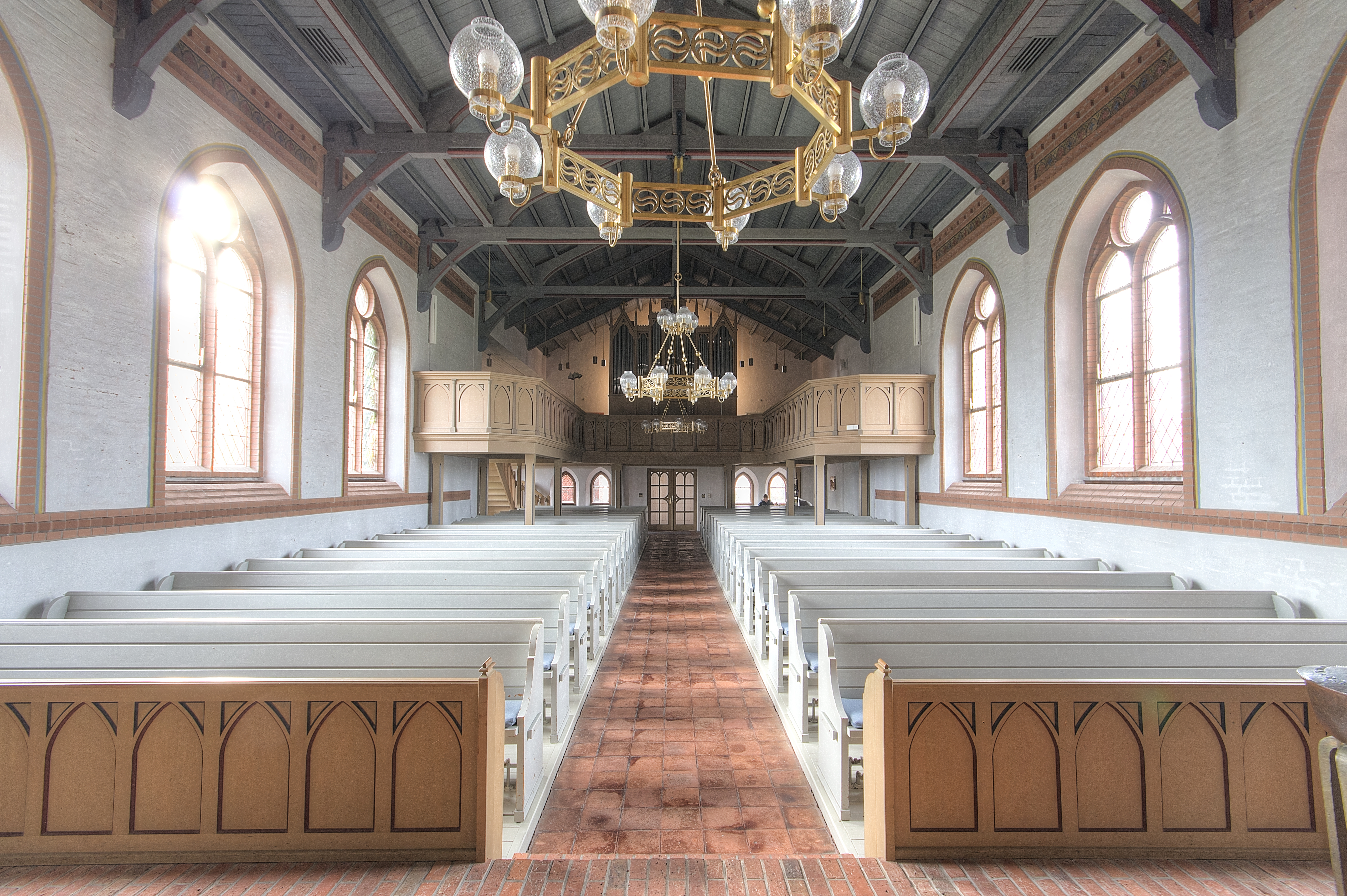 Inselkirche Langenoog Innenansicht Denkmal 00012